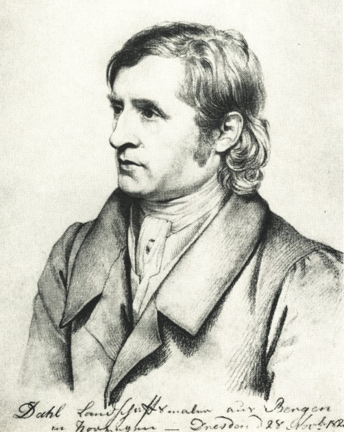 Porträt des Malers Johan Christian Clausen Dahl